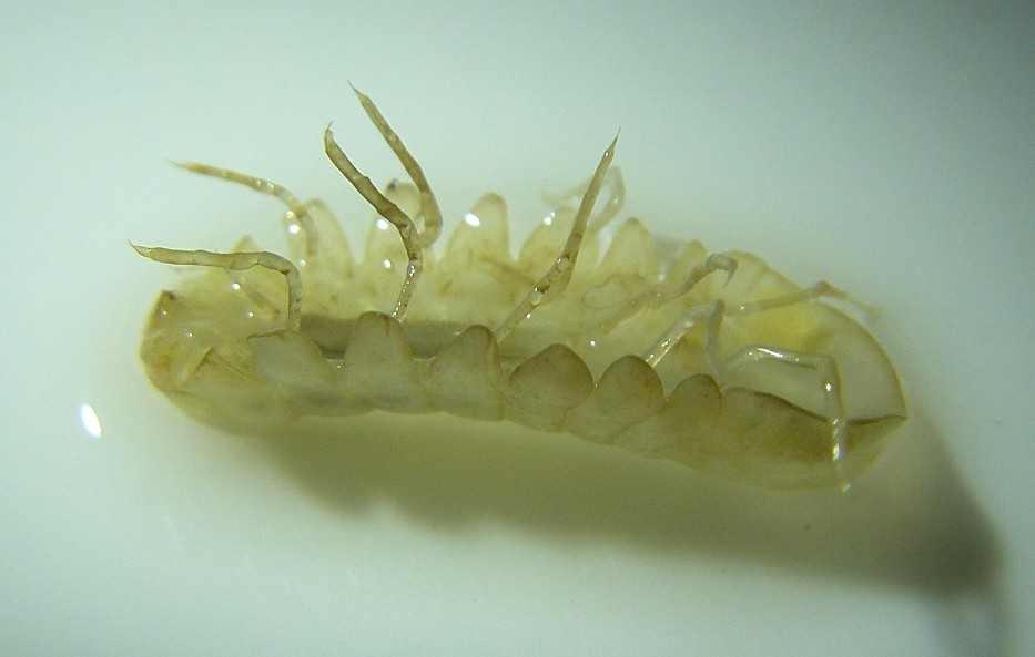 Cæcosphæroma posé sur le dos. Celui-ci provient du Spéléodrome de Nancy (Villers-lès-Nancy, France)